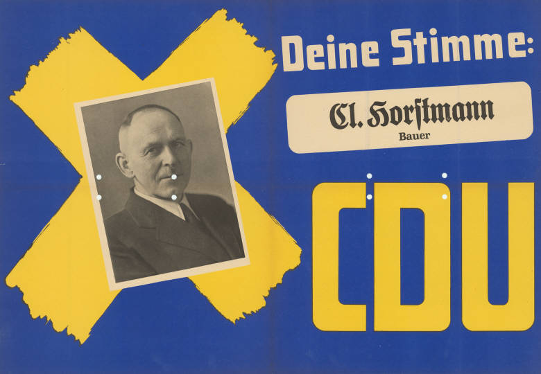 Deine Stimme: Cl. Horstmann Bauer CDU Abbildung: Porträtfoto - Stimmkreuz Plakatart: Kandidaten-/Personenplakat mit Porträt Objekt-Signatur: 10-009 : 197 Bestand: Landtagswahlplakate Nordrhein-Westfalen (10-009) GliederungBestand10-18: Landtagswahlplakate Nordrhein-Westfalen (10-009) » Landtagswahl am 18.6.1950 » CDU » mit Porträtfoto Lizenz: KAS/ACDP 10-009 : 197 CC-BY-SA 3.0 DE